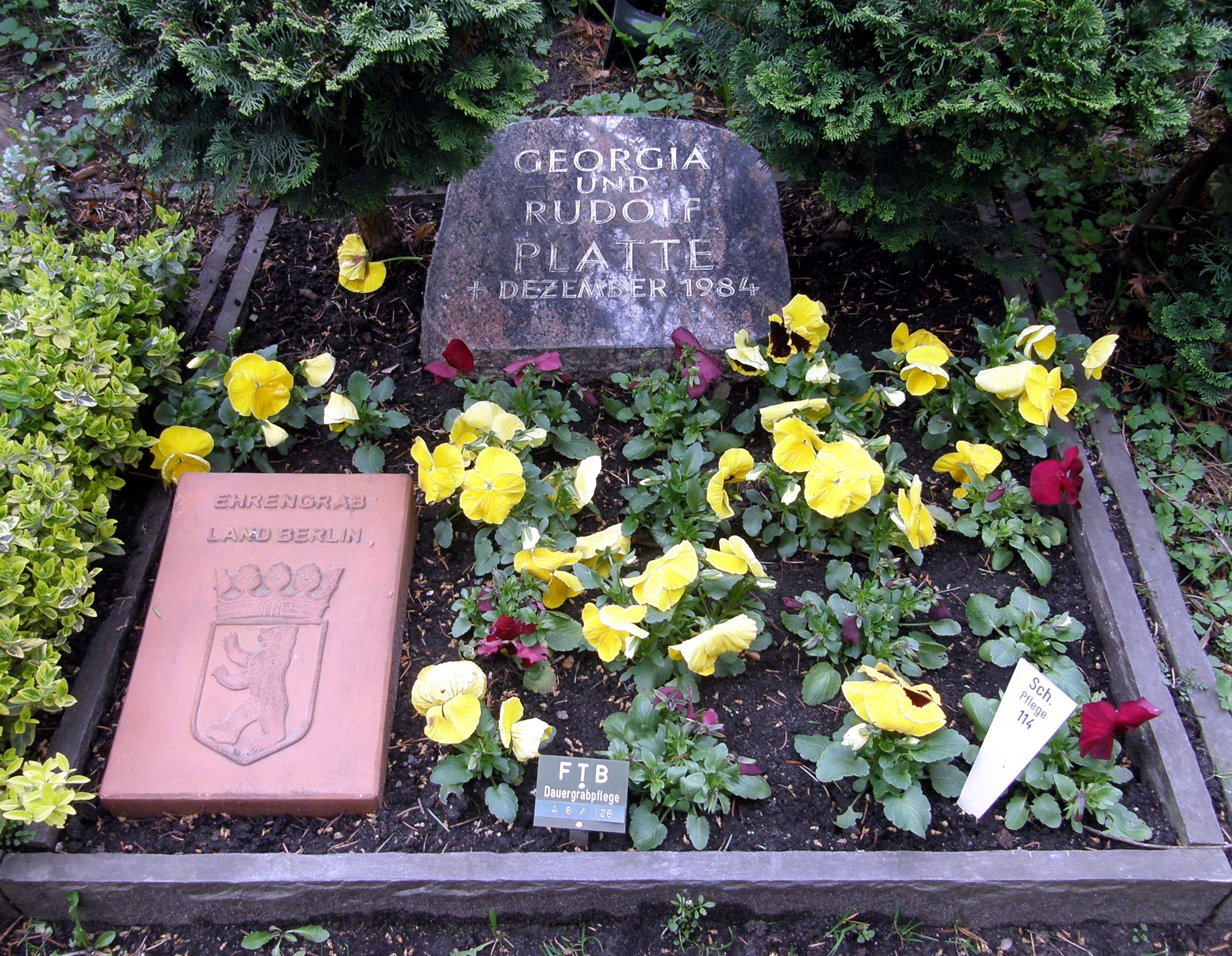 Grab der Schauspieler Rudolf Platte und Georgia Lind auf dem Friedhof Wilmersdorf in Berlin